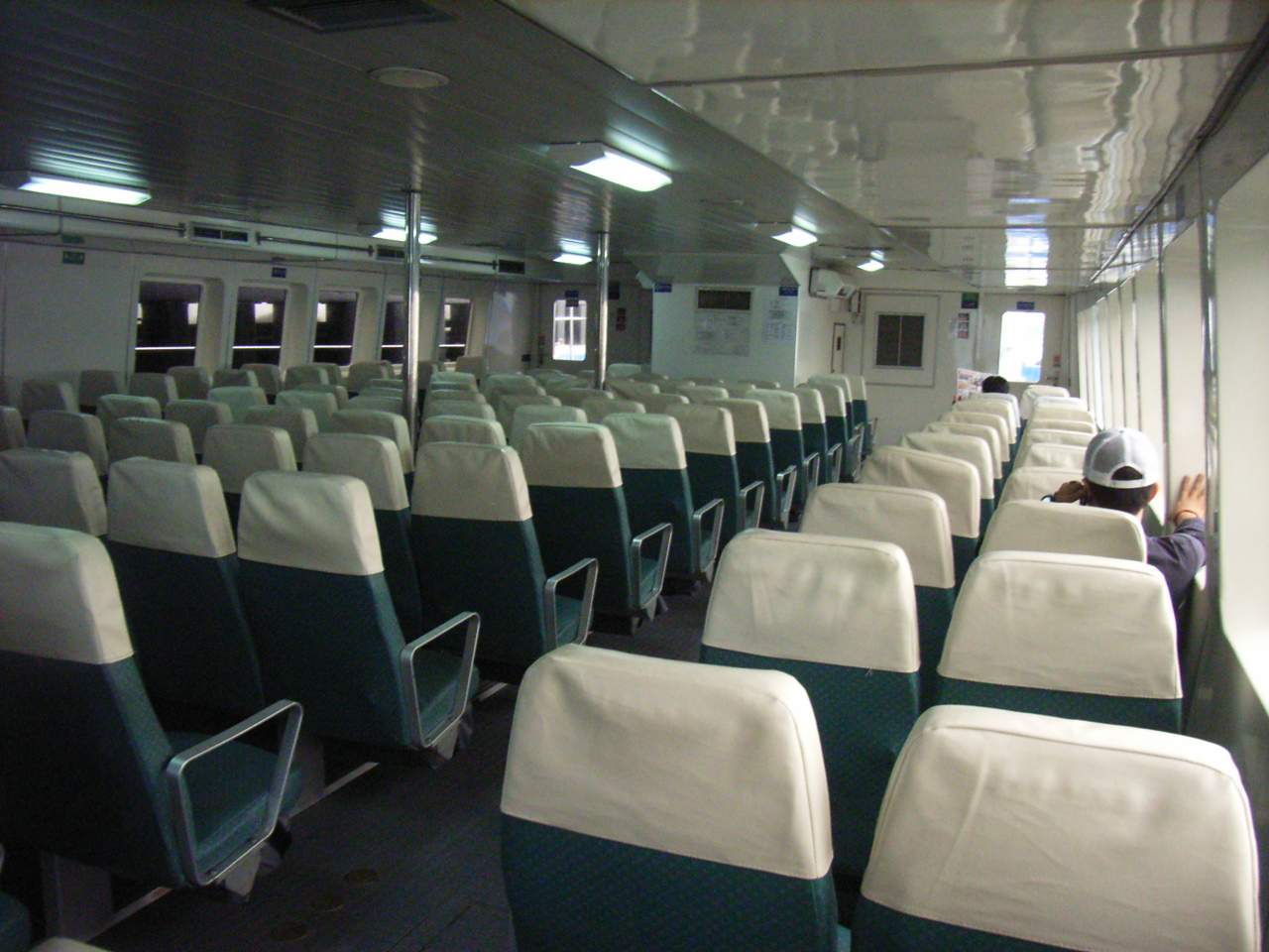 尖東碼頭 是位於zh:香港zh:尖沙咀東zh:梳士巴利道海旁的zh:躉船zh:碼頭。 Hoi You Ferry 經營航線: 海祐小輪往zh:中環8號碼頭zh:飛翔船航線，單程$4.5，班次約20分鐘一班